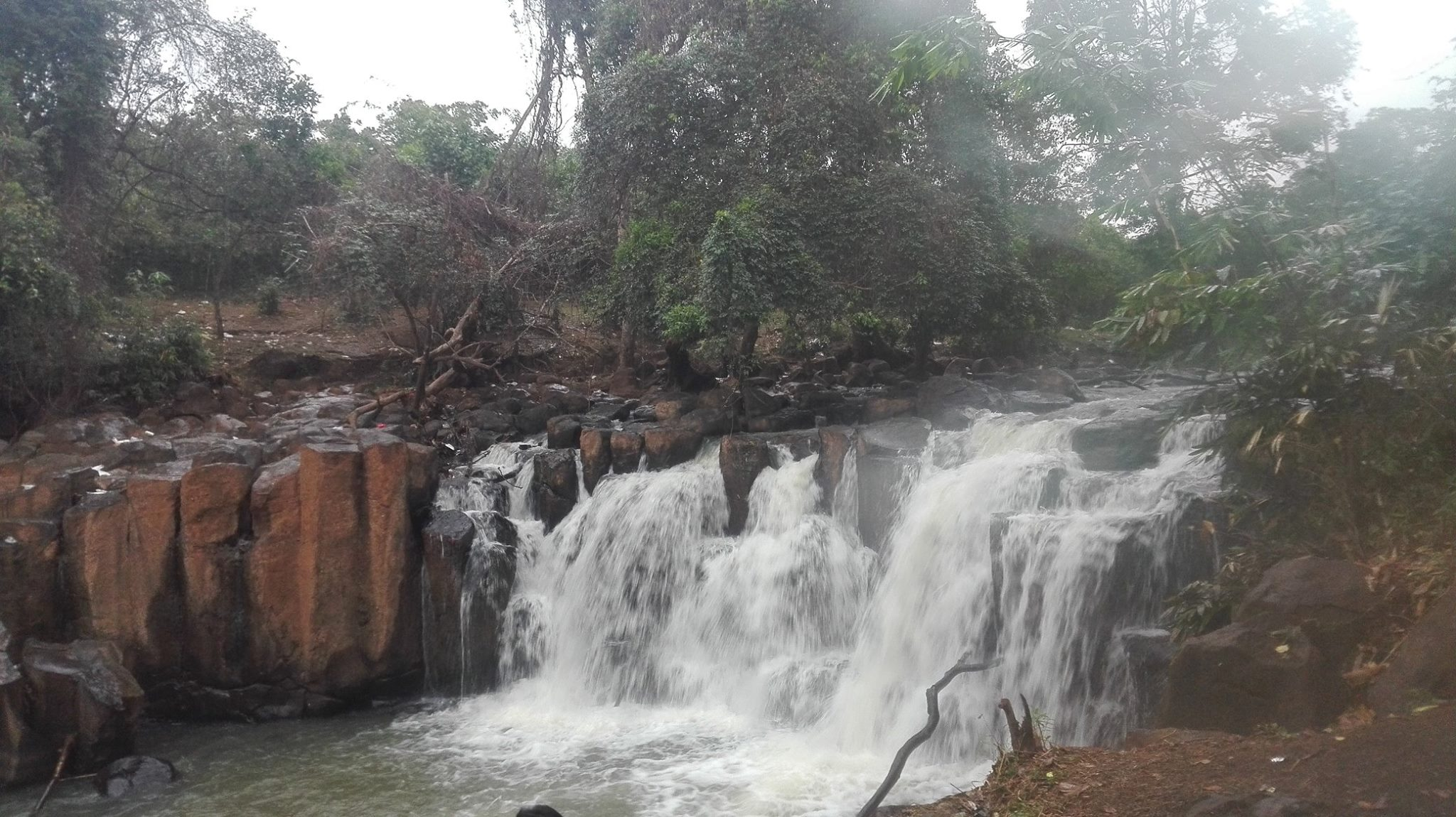 Thác Đứng, Bù Đăng, Bình Phước